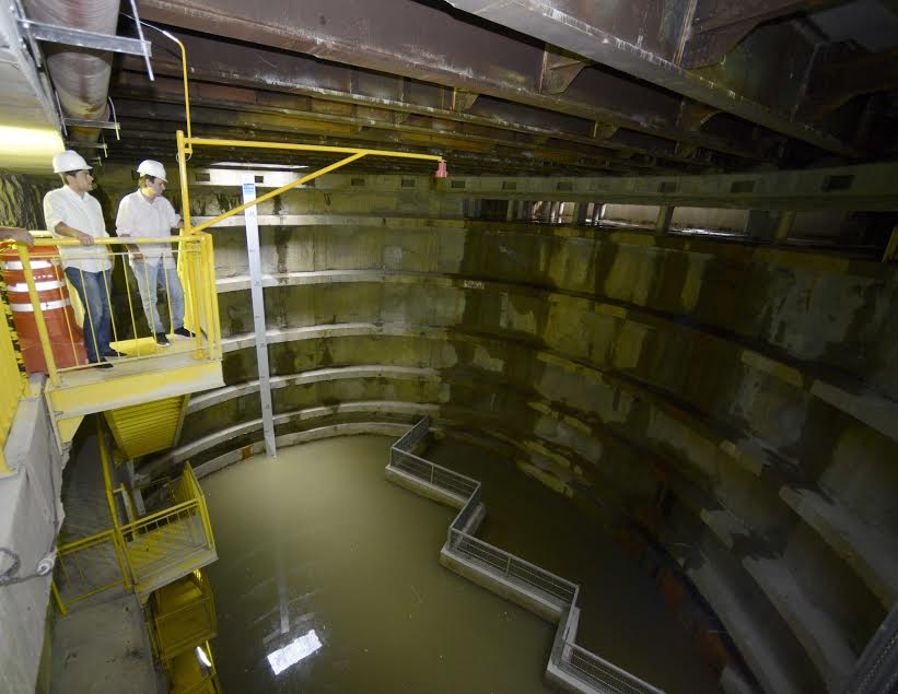 Um dos reservatório de águas pluviais da Praça Niterói em 2015.